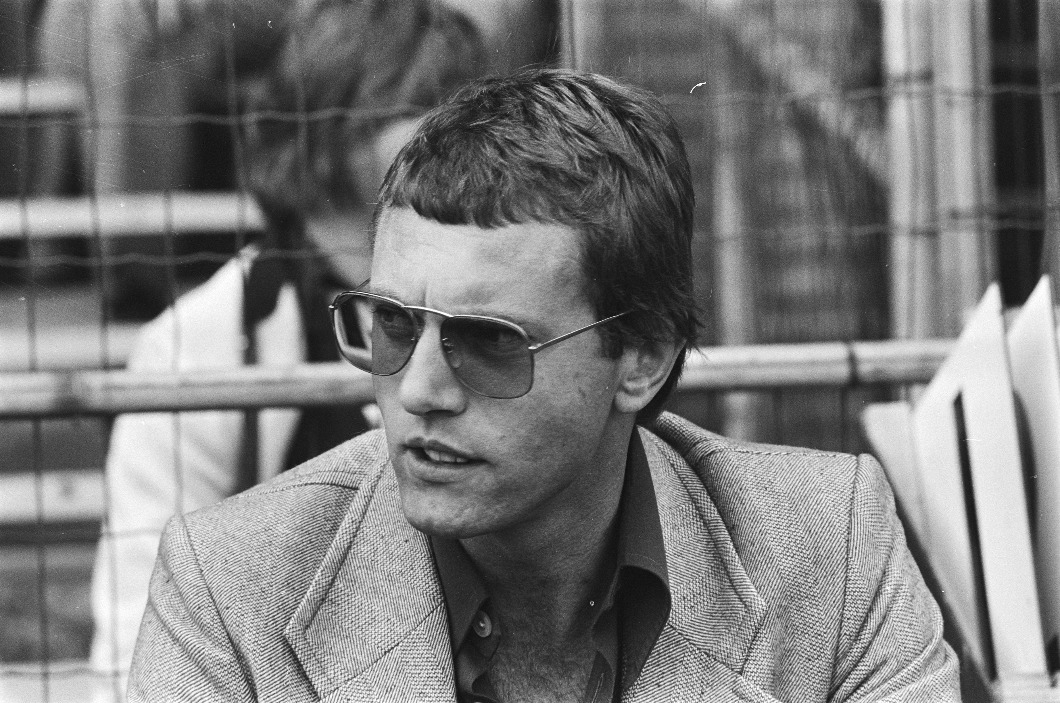 Collectie / Archief : Fotocollectie Anefo Reportage / Serie : [ onbekend ] Beschrijving : Ajax tegen PEC Zwolle 4-2, trainer PEC Fritz Korbach (kop) Datum : 3 september 1978 Trefwoorden : sport, trainers, voetbal Persoonsnaam : Korbach, Fritz Instellingsnaam : PEC Zwolle Fotograaf : Verhoeff, Bert / Anefo, [onbekend] Auteursrechthebbende : Nationaal Archief Materiaalsoort : Negatief (zwart/wit) Nummer archiefinventaris : bekijk toegang 2.24.01.05 Bestanddeelnummer : 929-8834